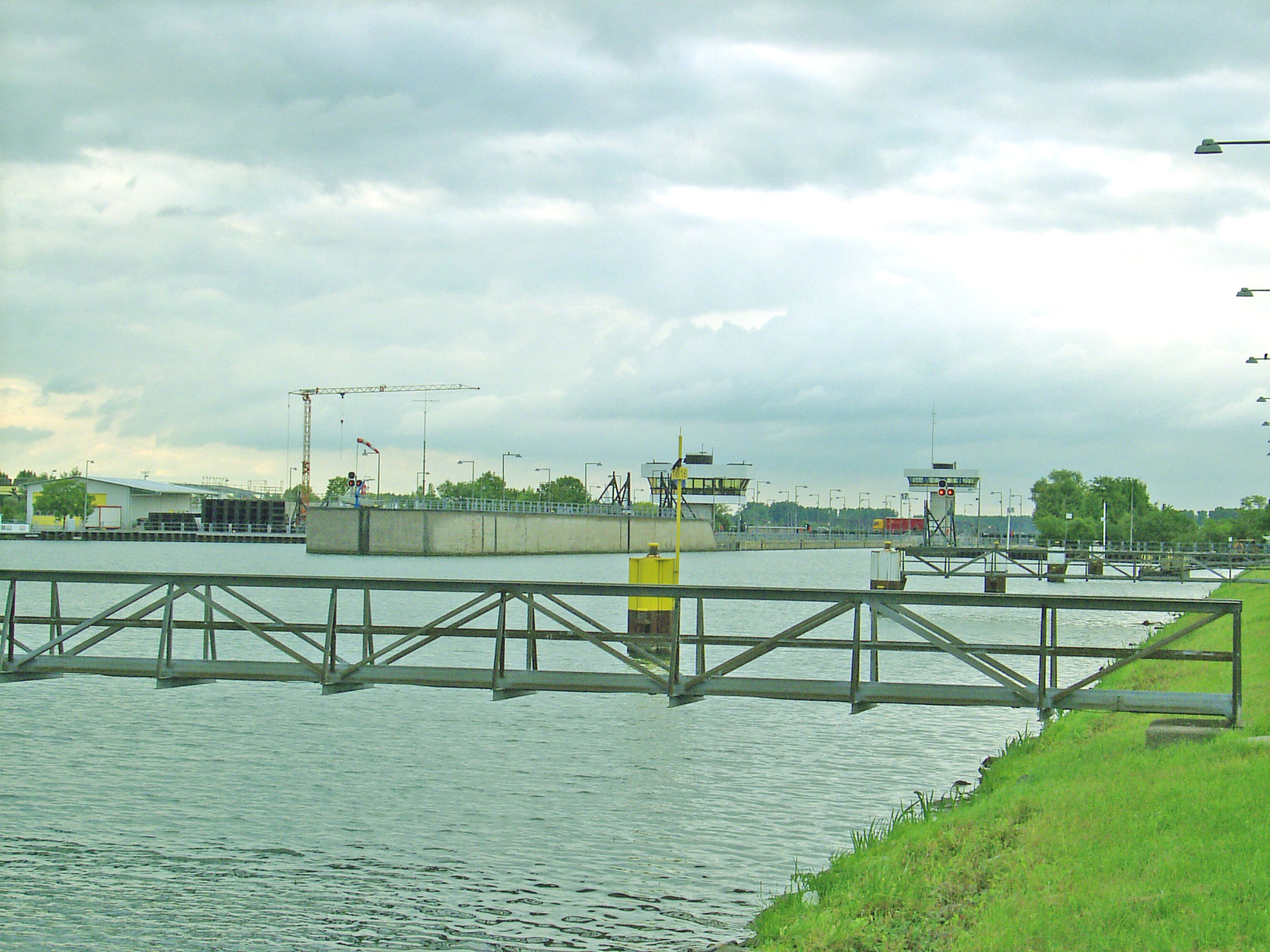 Awanport śluzy w Iffezheim